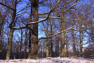 pokroucené duby